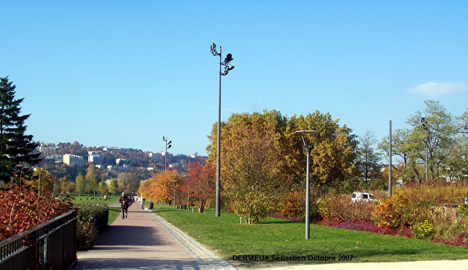 Le parc de Gerland, octobre 2007